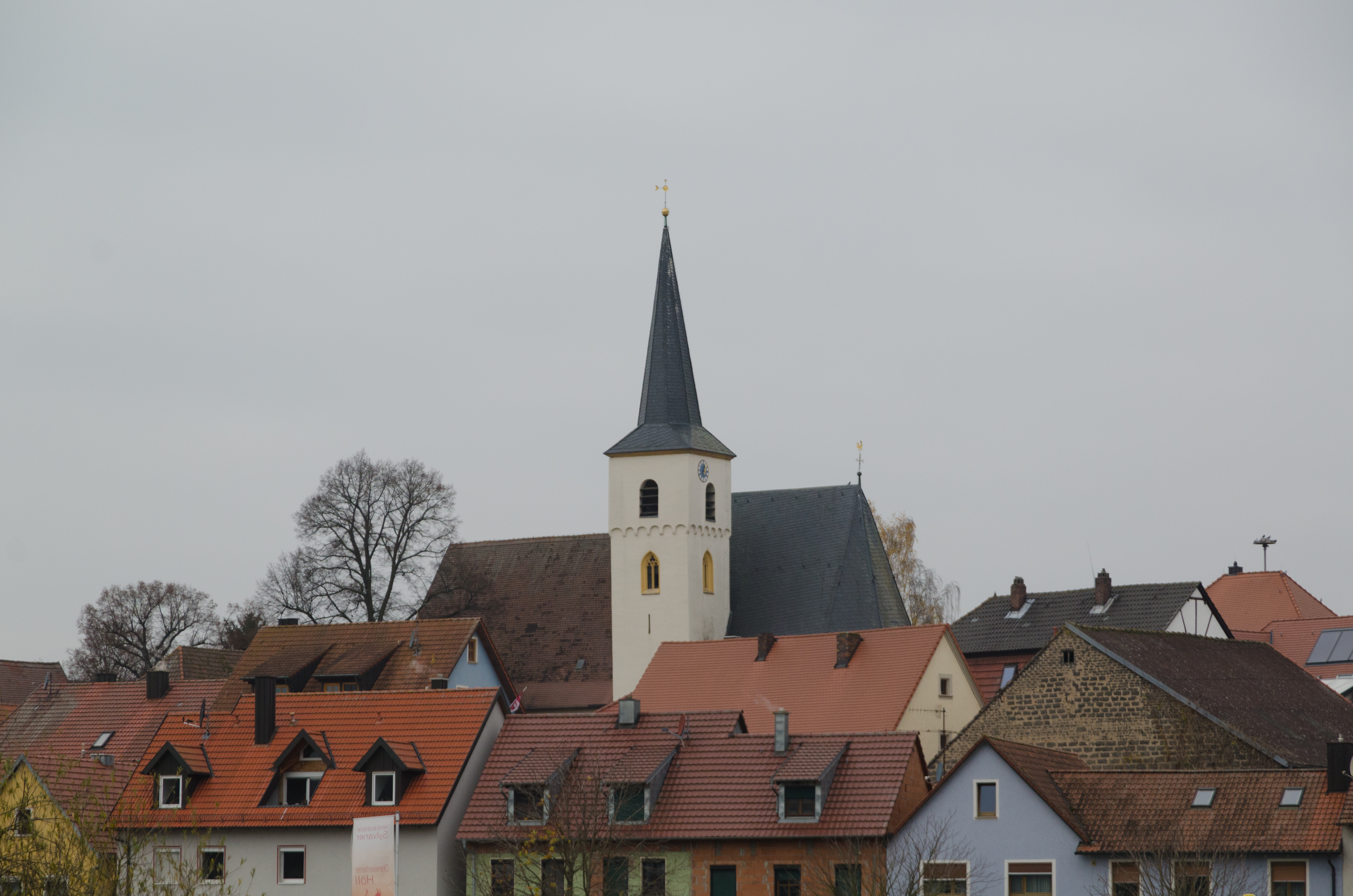 Obereisenheim, Evang.-Luth. Pfarrkirche